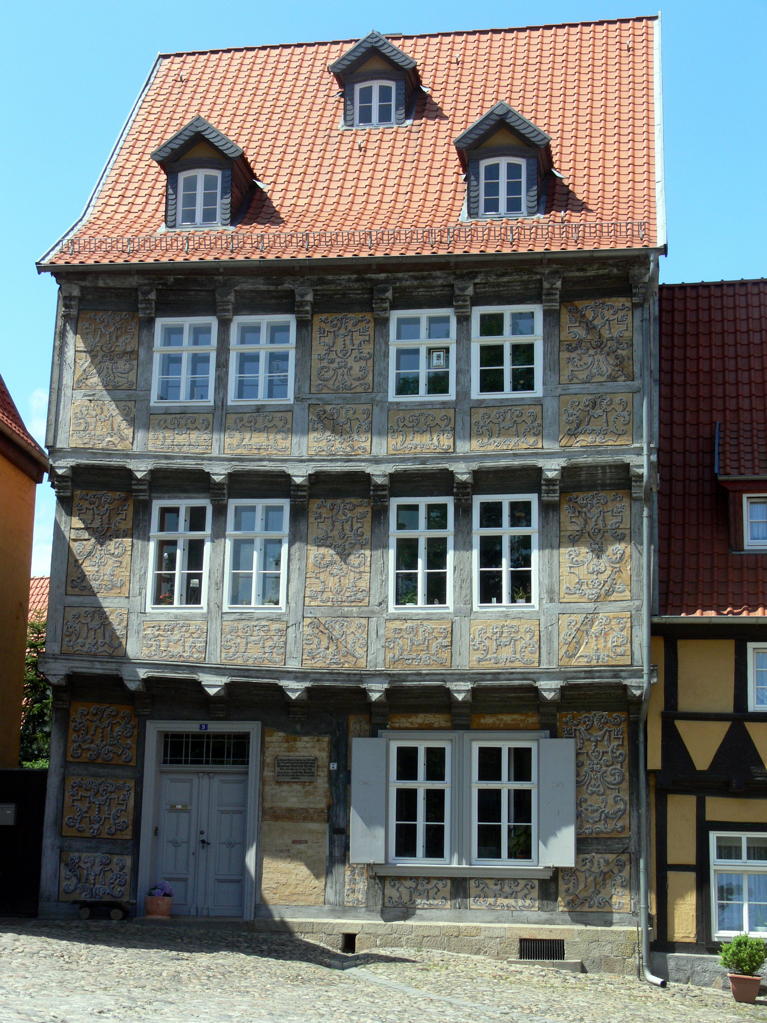 Fachwerkhaus Sclossberg 9 in Quedlinburg.